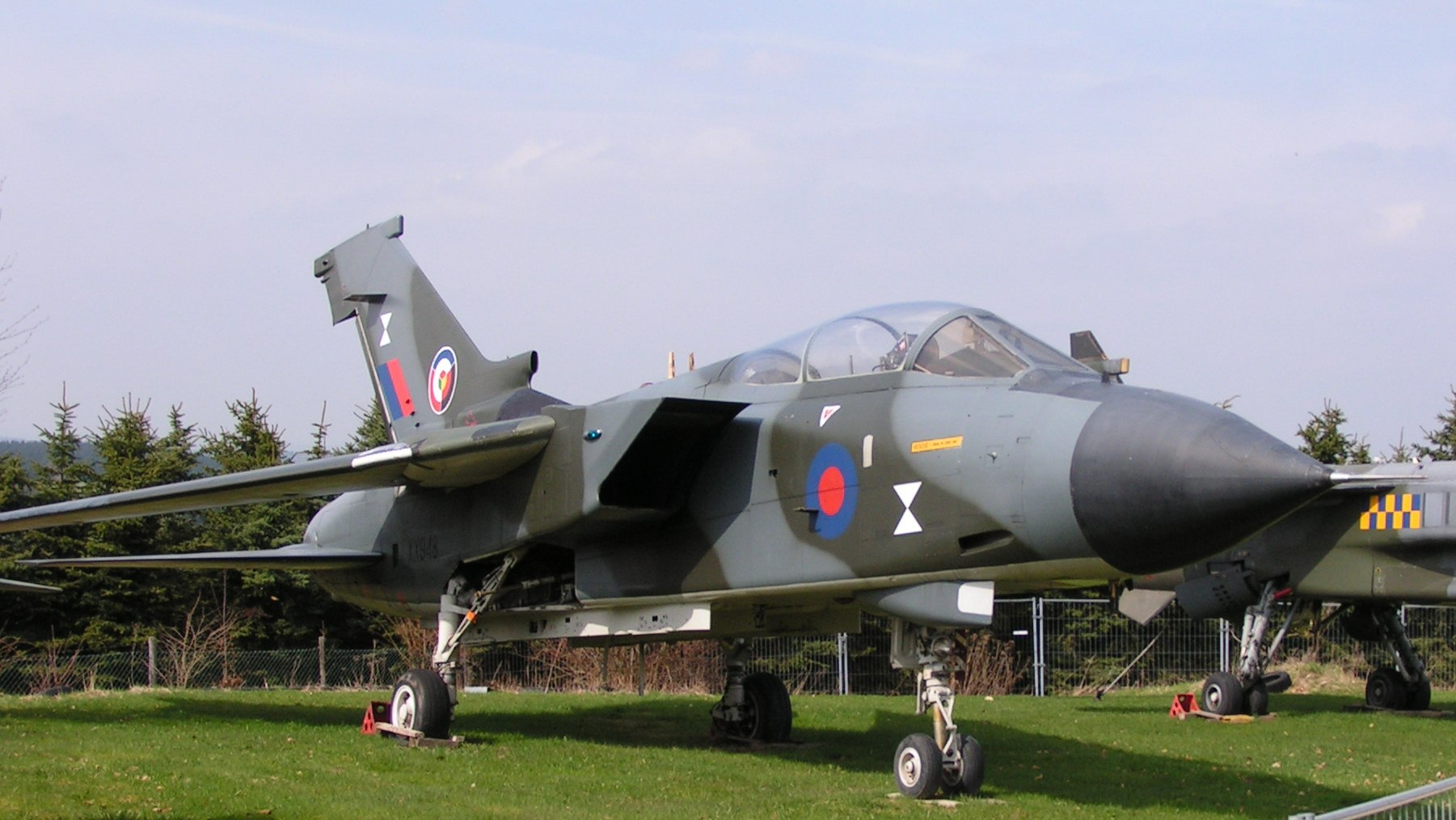 Panavia Tornado - eigen foto